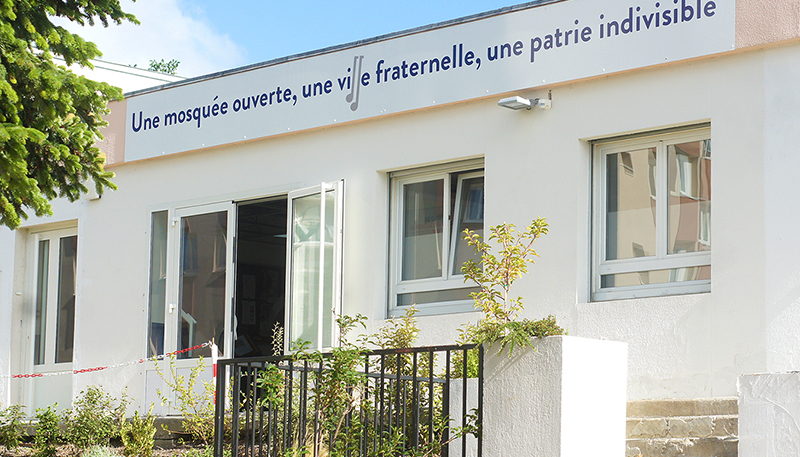 Devanture de la Mosquée Mantes Sud